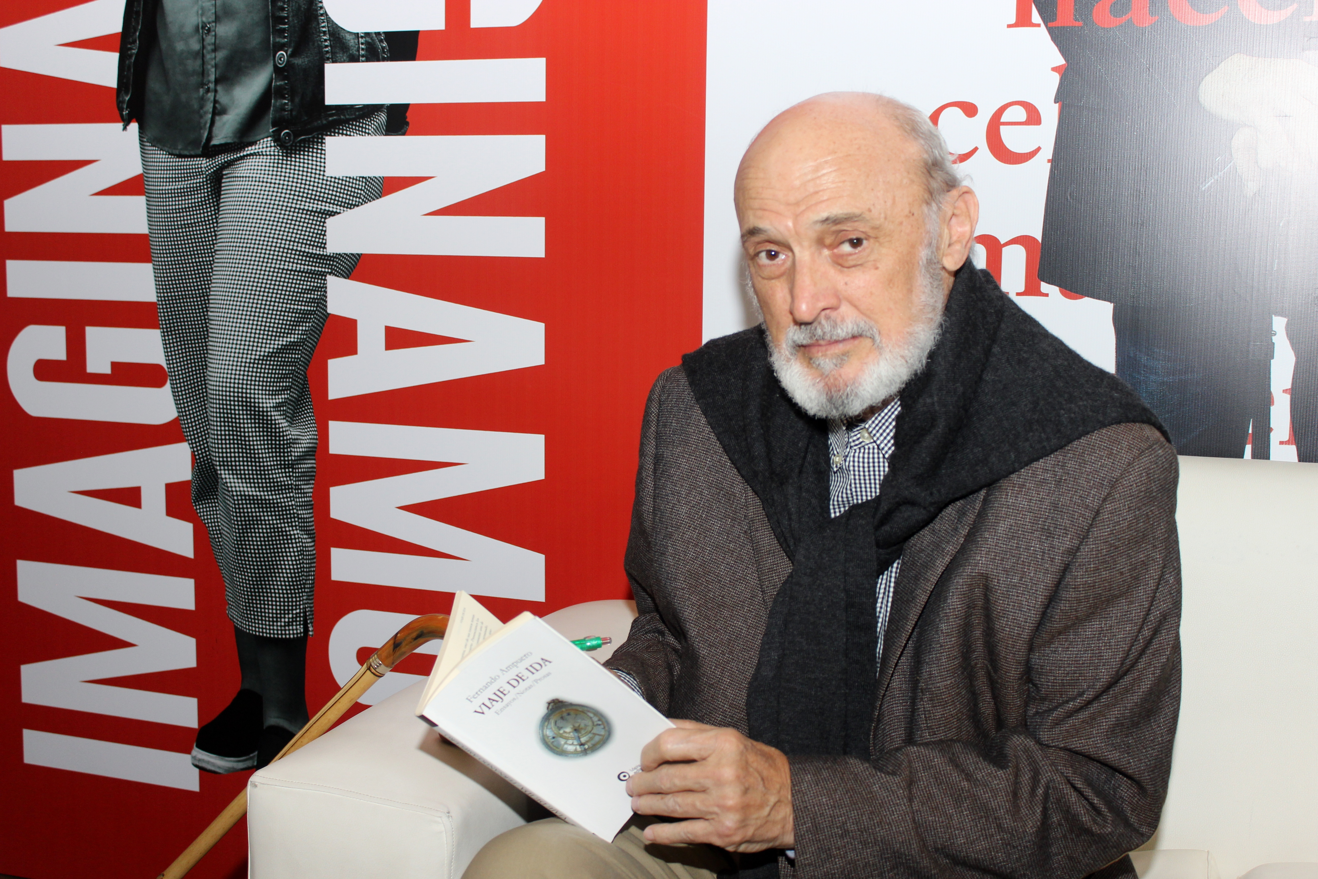 El escritor peruano Fernando Ampuero en la Feria Internacional del Libro de Santiago 2018.